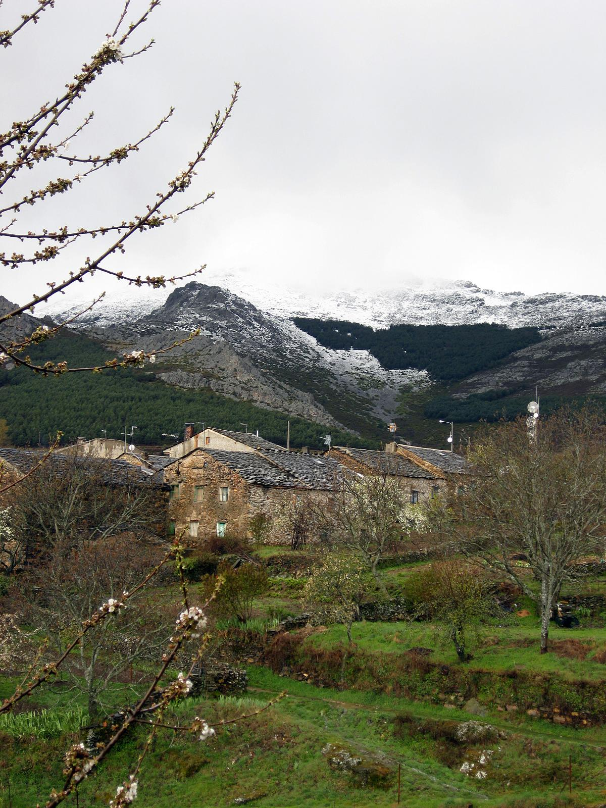 Valverde de los Arroyos (Guadalajara, España).